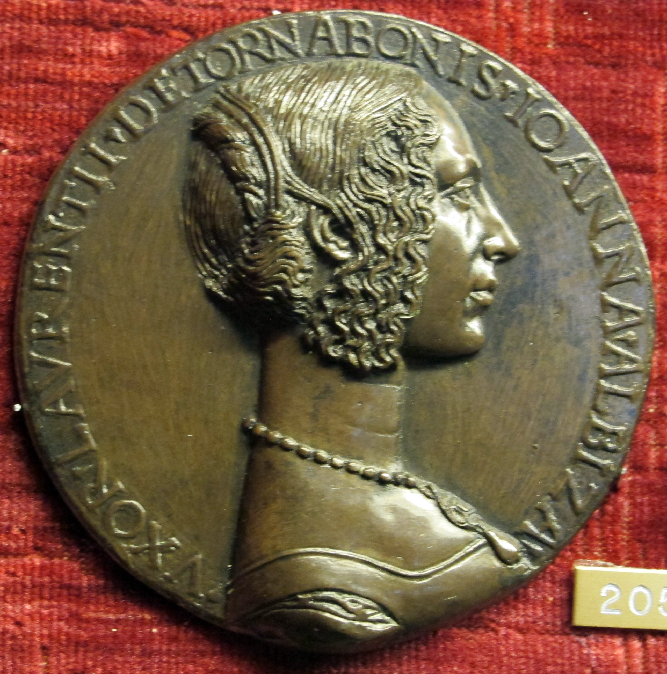 Niccolò di forzore spinelli, medaglia di giovanna tornabuoni